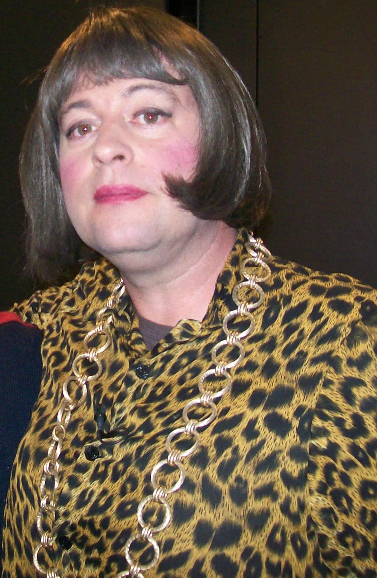 El actor argentino Fabio Alberti, interpretando al personaje de Coty Nosiglia en el sketch de Boluda Total. Tomada en los estudios de América Televisión del barrio porteño de Palermo.